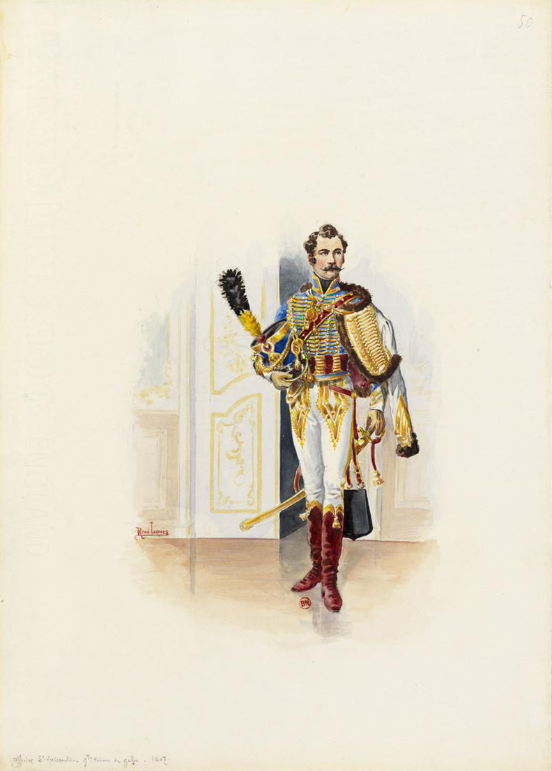 Officier en grande tenue de gala du 5e Hussards en 1807.